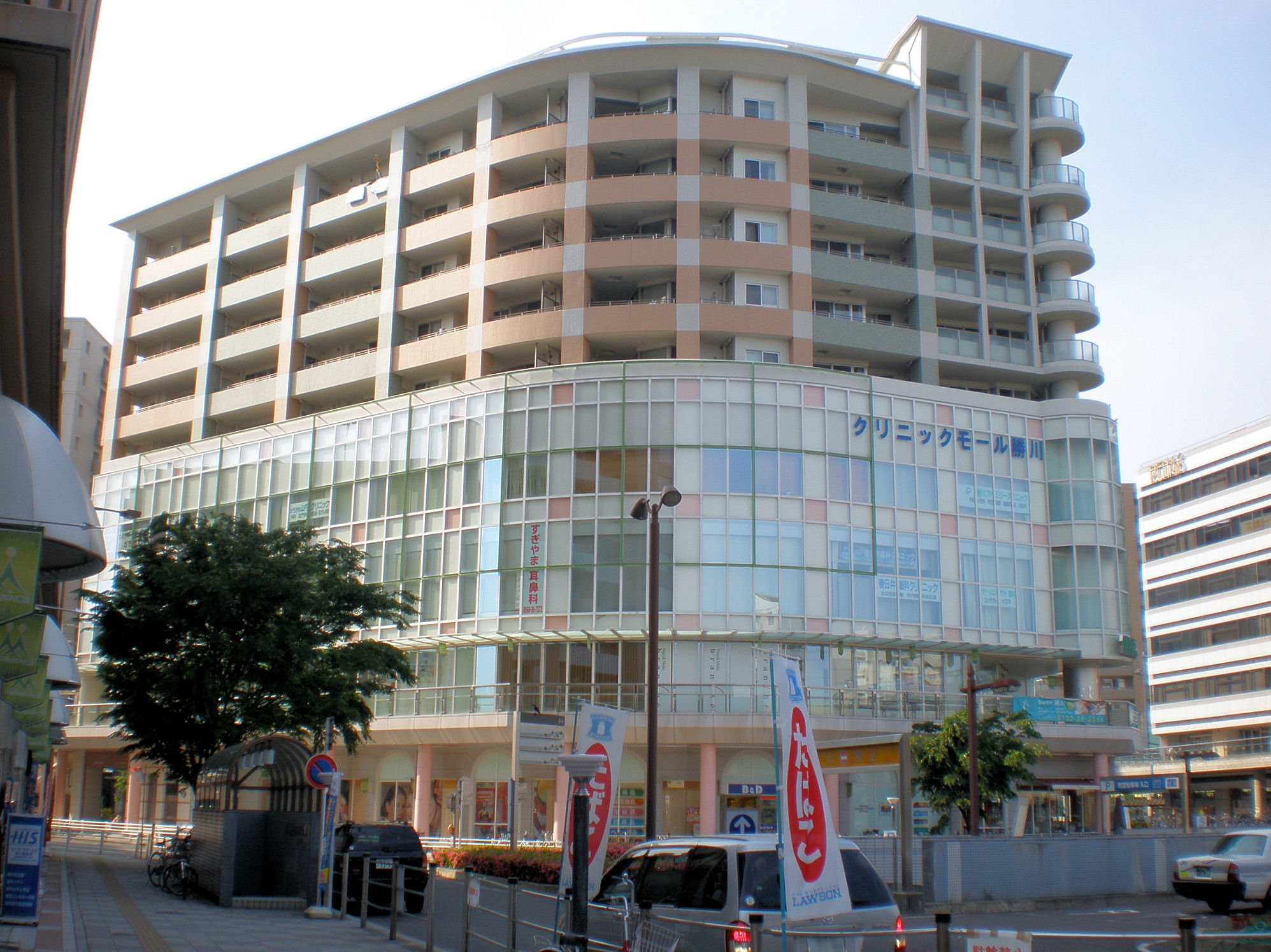 愛知県春日井市にあるクリニックモール勝川